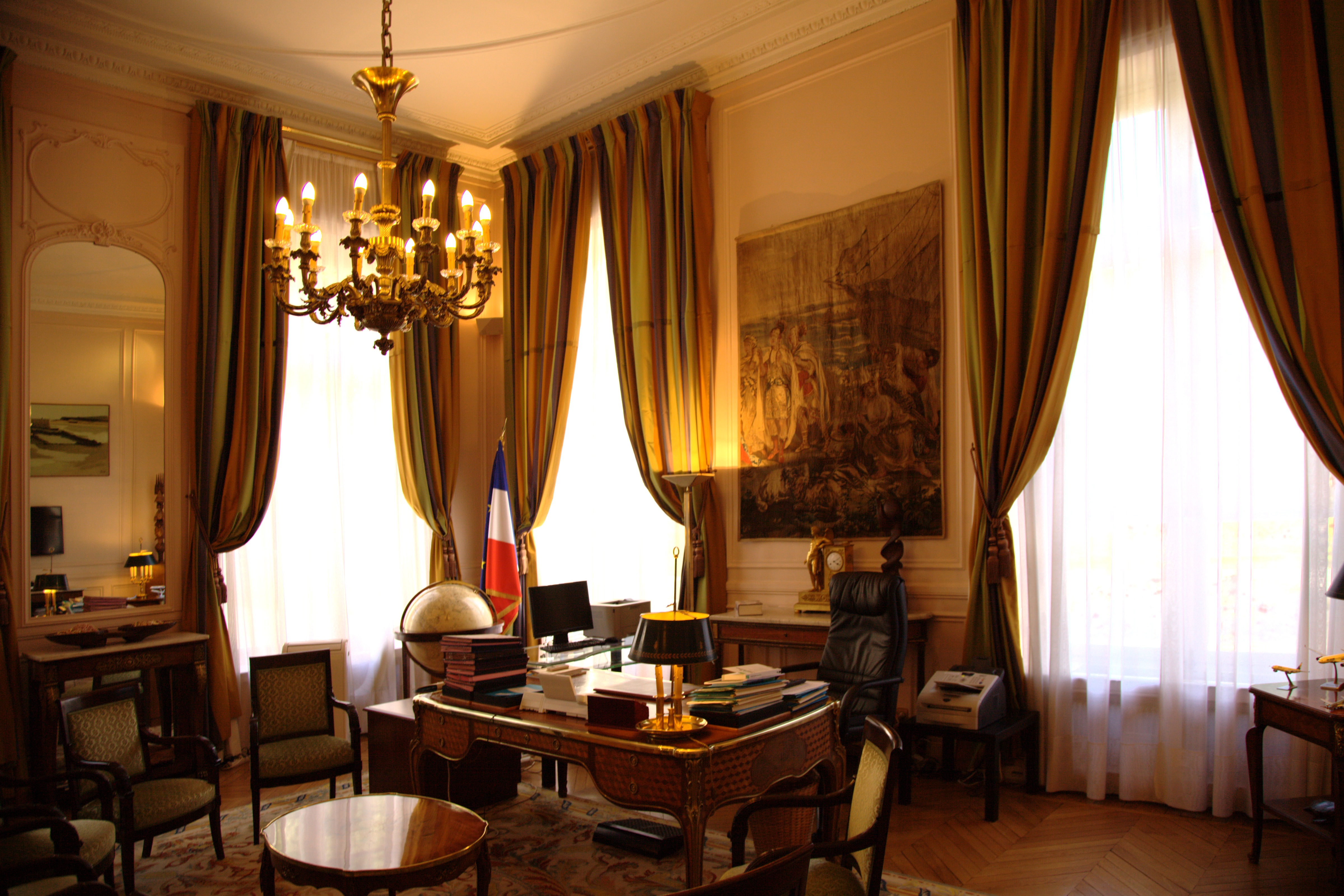 l'hôtel de Montmorin, Paris VII (aujourd'hui Ministère des Outre-Mer). Bureau du Ministre.